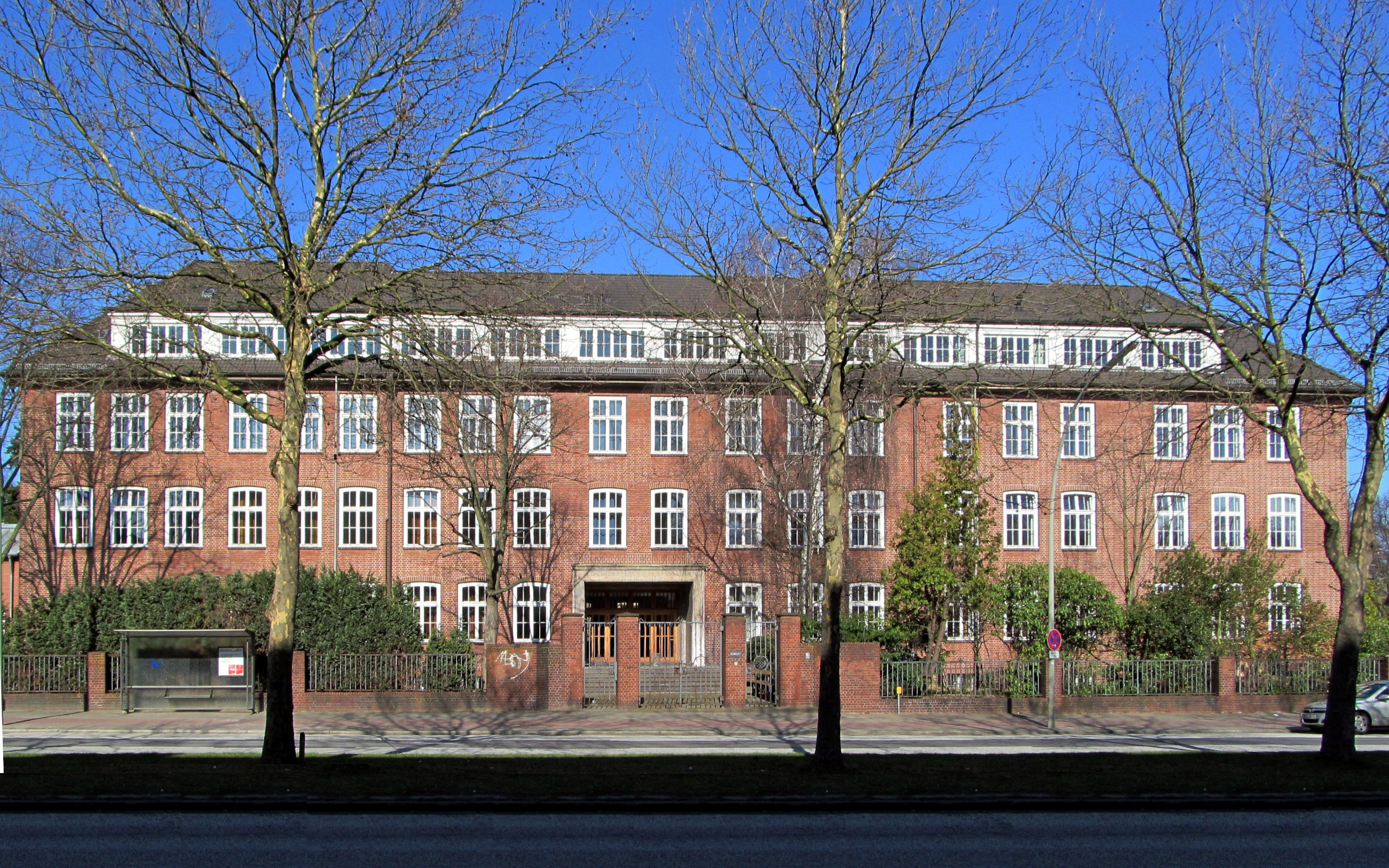 Gymnasium St. Ansgar, Hamburg. (Stürzende Linien bearbeitet, störende Fahrzeuge im Vordergrund entfernt.)